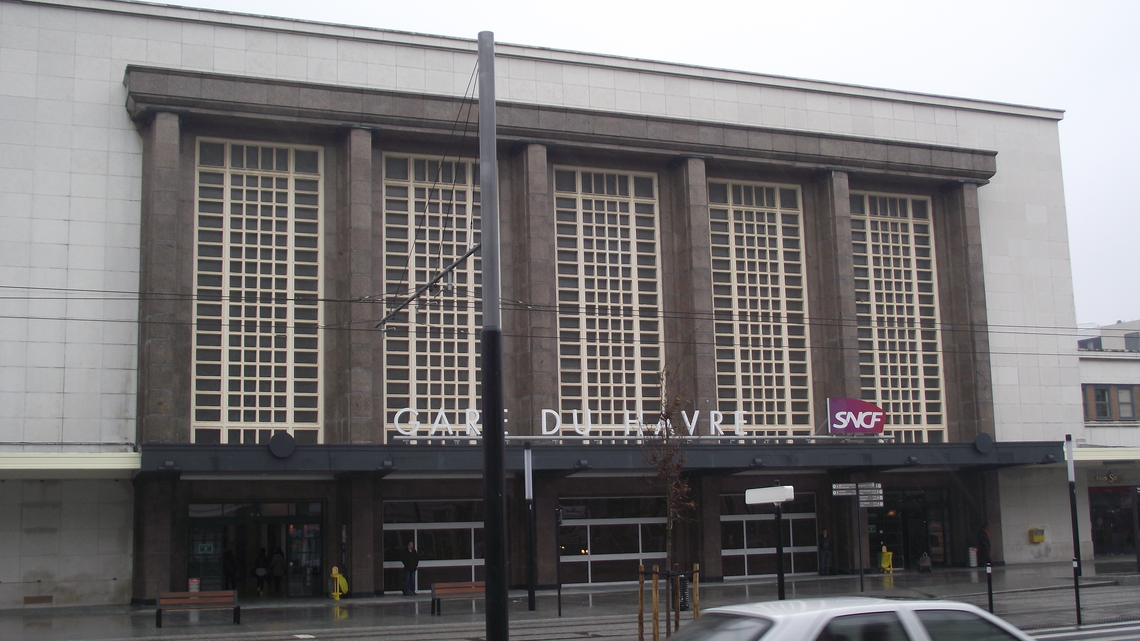 Voorkant van het station